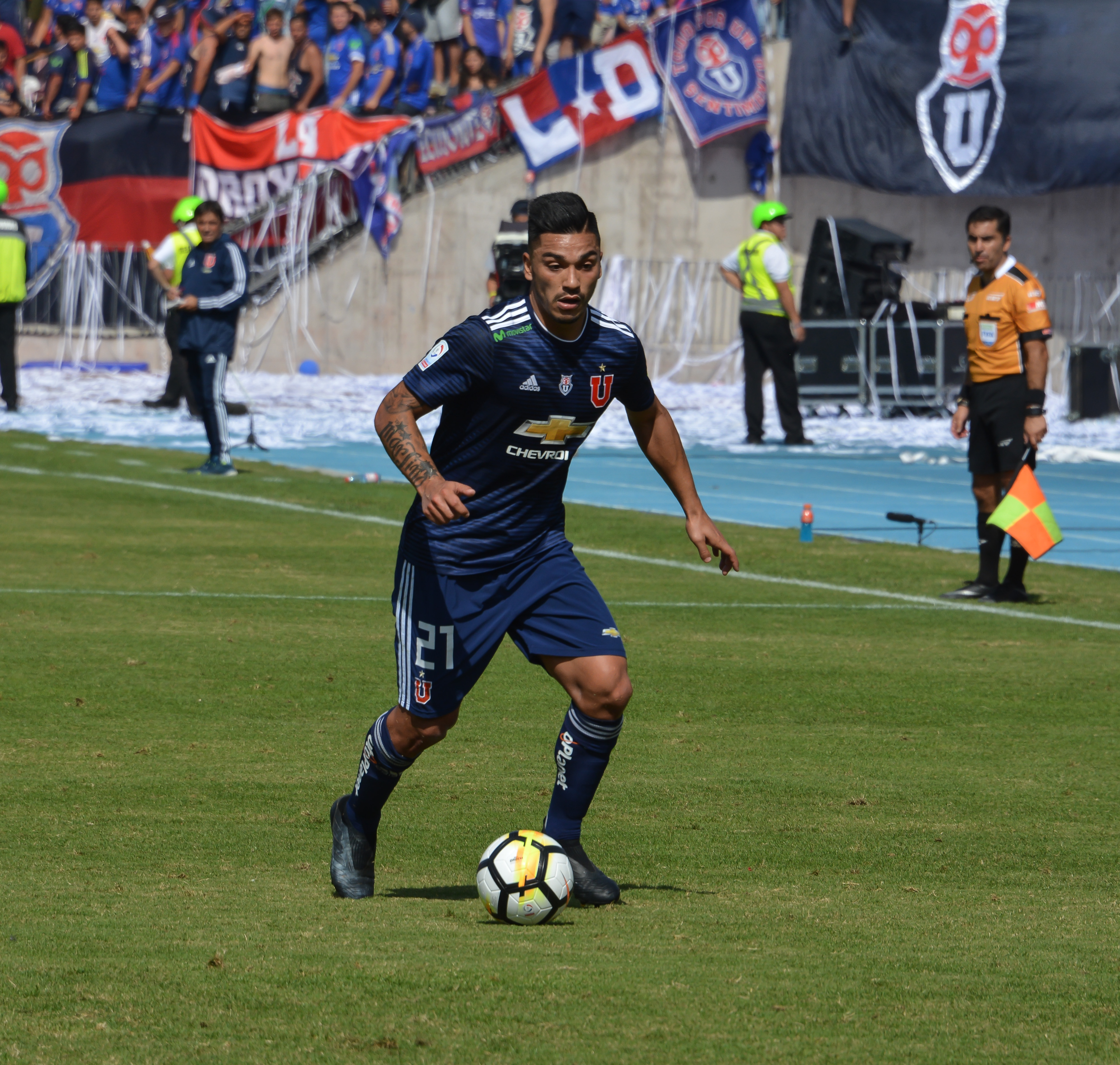 Universidad de Chile v Colo-Colo, Estadio Nacional, Santiago, Chile.